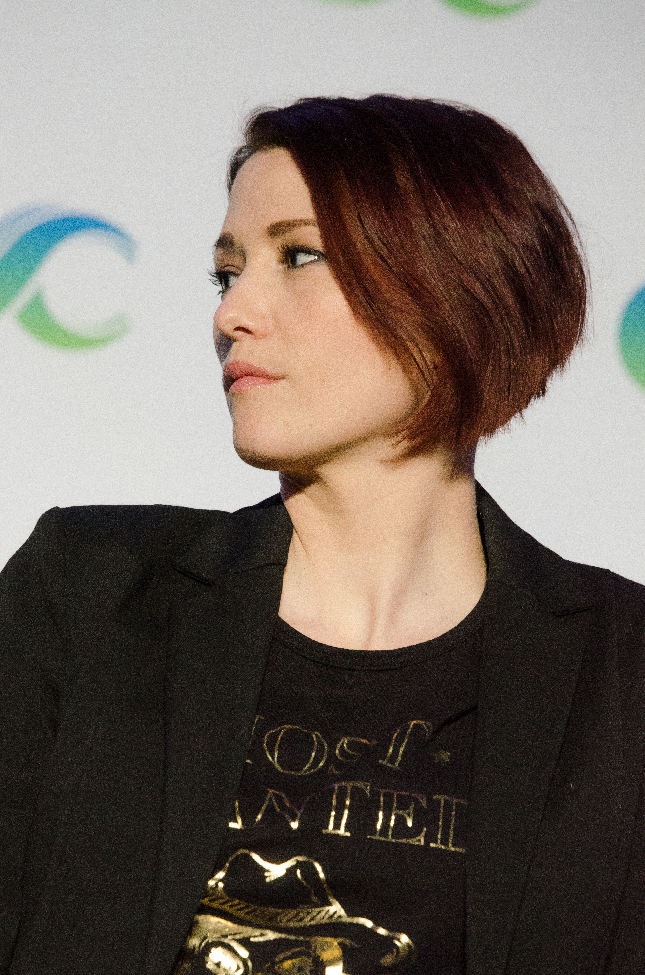 Chyler Leigh [4]